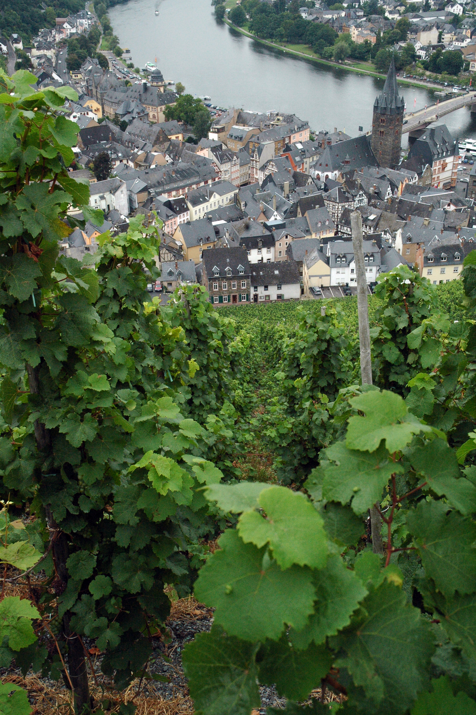 The famous vineyard Bernkasteler Doctor, Mosel, Germany. Der historische Weinberg Bernkasteler Doktor, Mittelmosel, Deutschland. Blick vom Weinberg auf Bernkastel-Kues mit der Mosel. own work by verita Author: verita